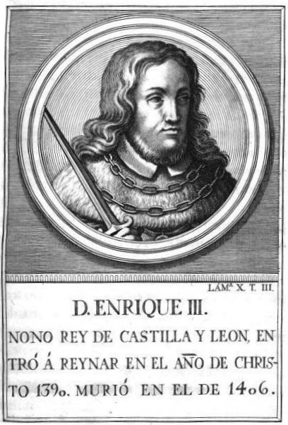 Retrato de Enrique III, noveno rey de Castilla y León , ilustración del libro Retratos de los reyes de España, desde Atanarico hasta ... D. Carlos III, editado por Lorenzo de San Martín, 1788.